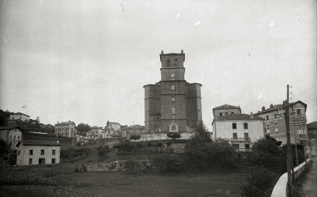 Título original: Vista general de la iglesia de la localidad de Oiartzun (1/1) Localización: Oyarzun (Guipúzcoa)